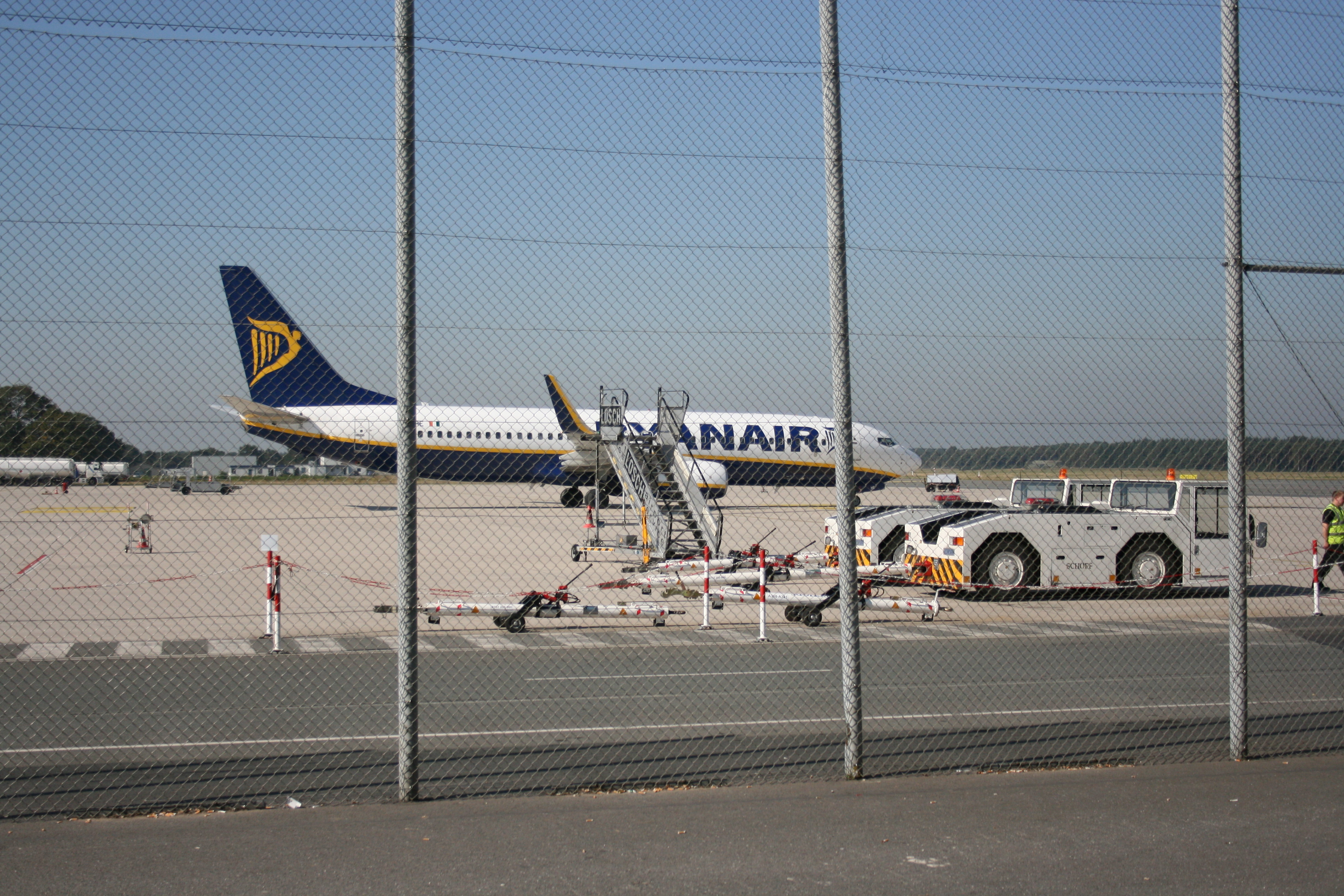 Flughafen in Weeze